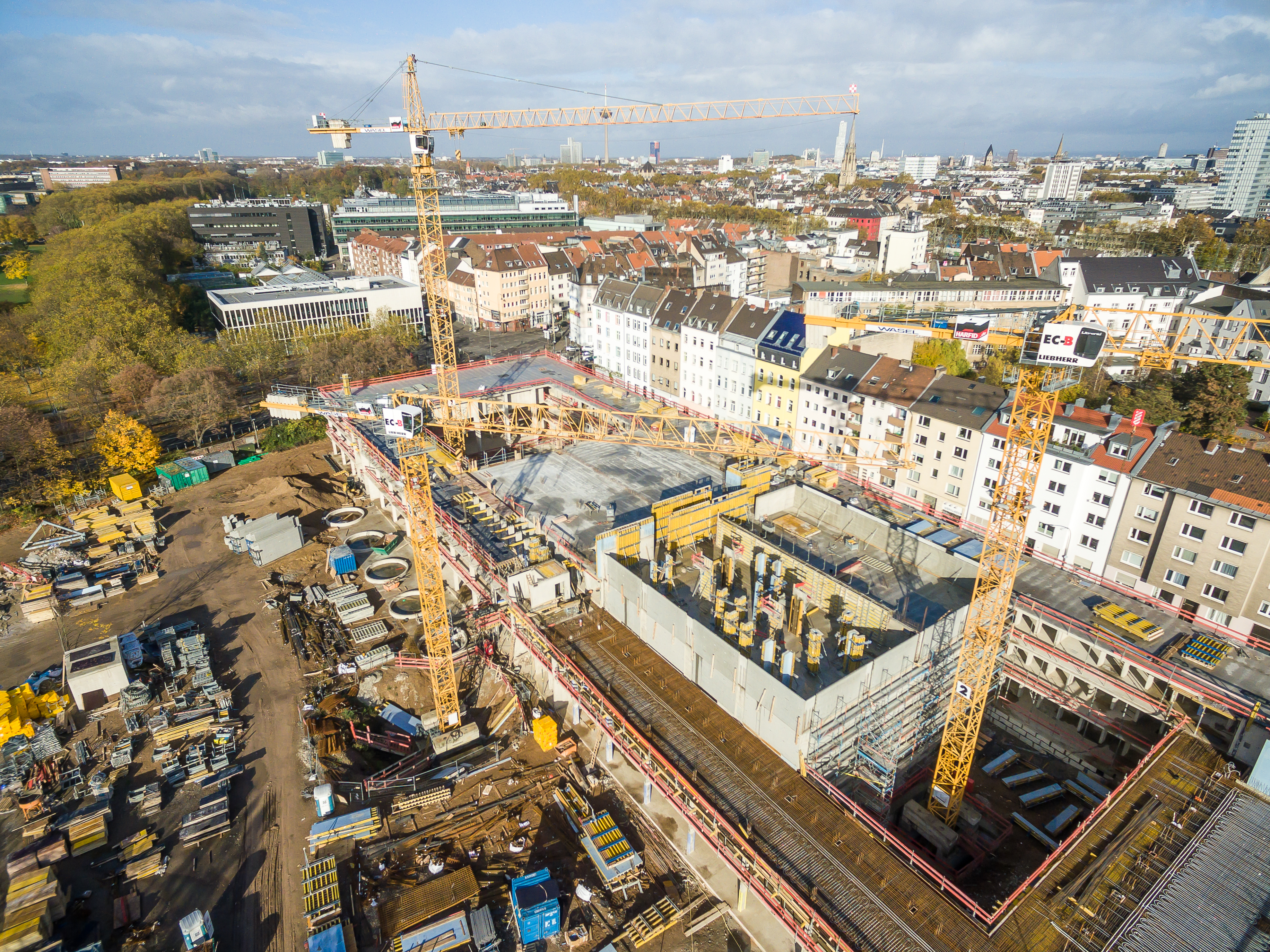 Neubau Historisches Archiv der Stadt Köln - Luftaufnahmen November 2017